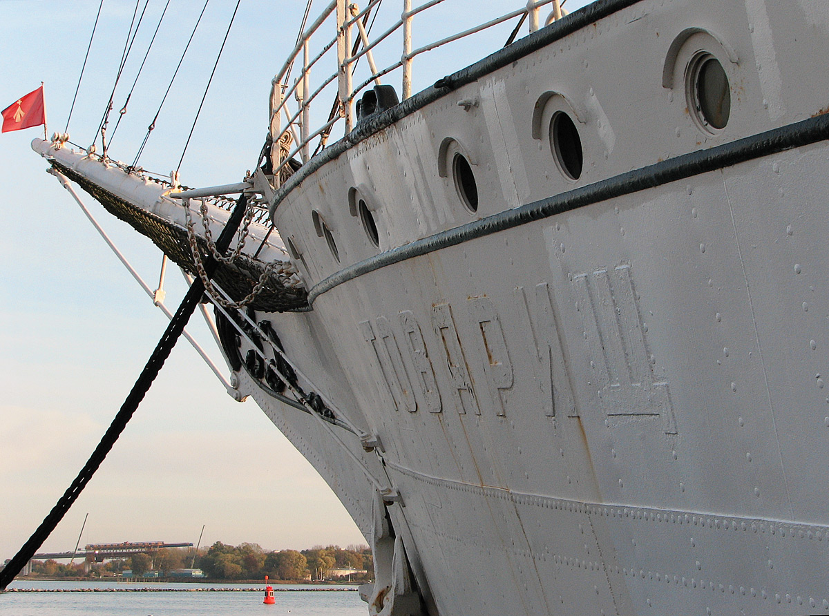 Beschreibung: Gorch Fock I in Stralsund / Alter russischer Schriftzug Towarisch "товарищ" Fotograf: Darkone, 10. November 2005